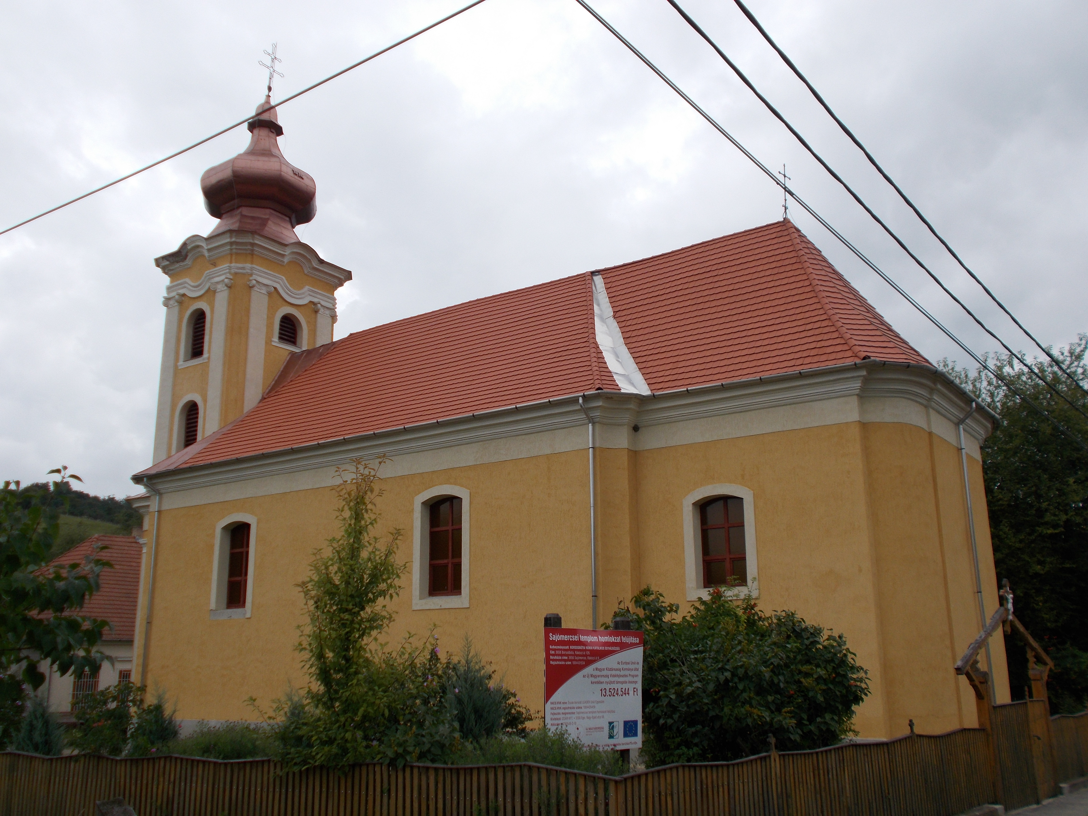 A sajómercsei római katolikus templom